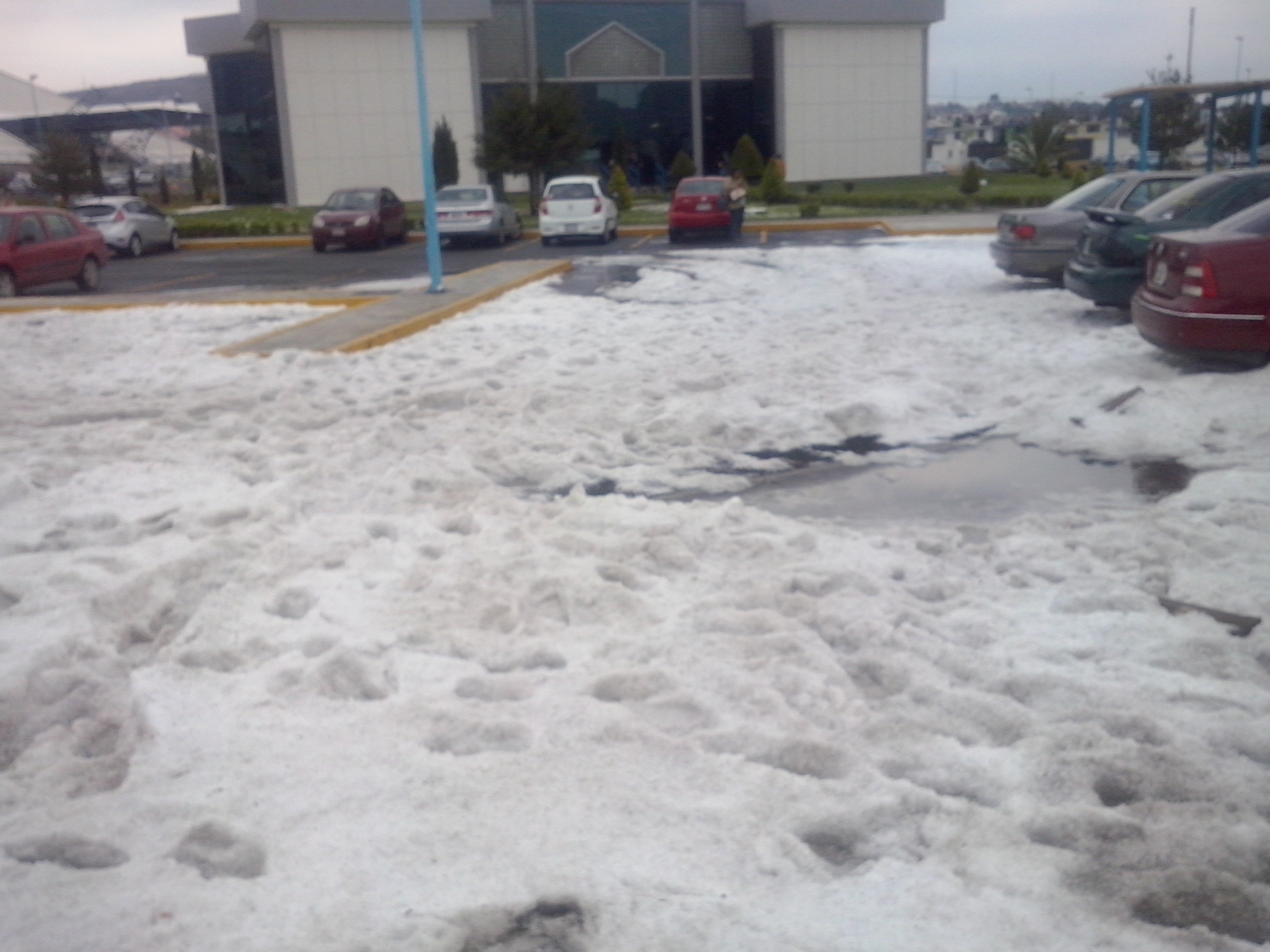 Granizada en la Ciudad Universitaria de la UAEH en Mineral de la Reforma, Hidalgo en Méxic